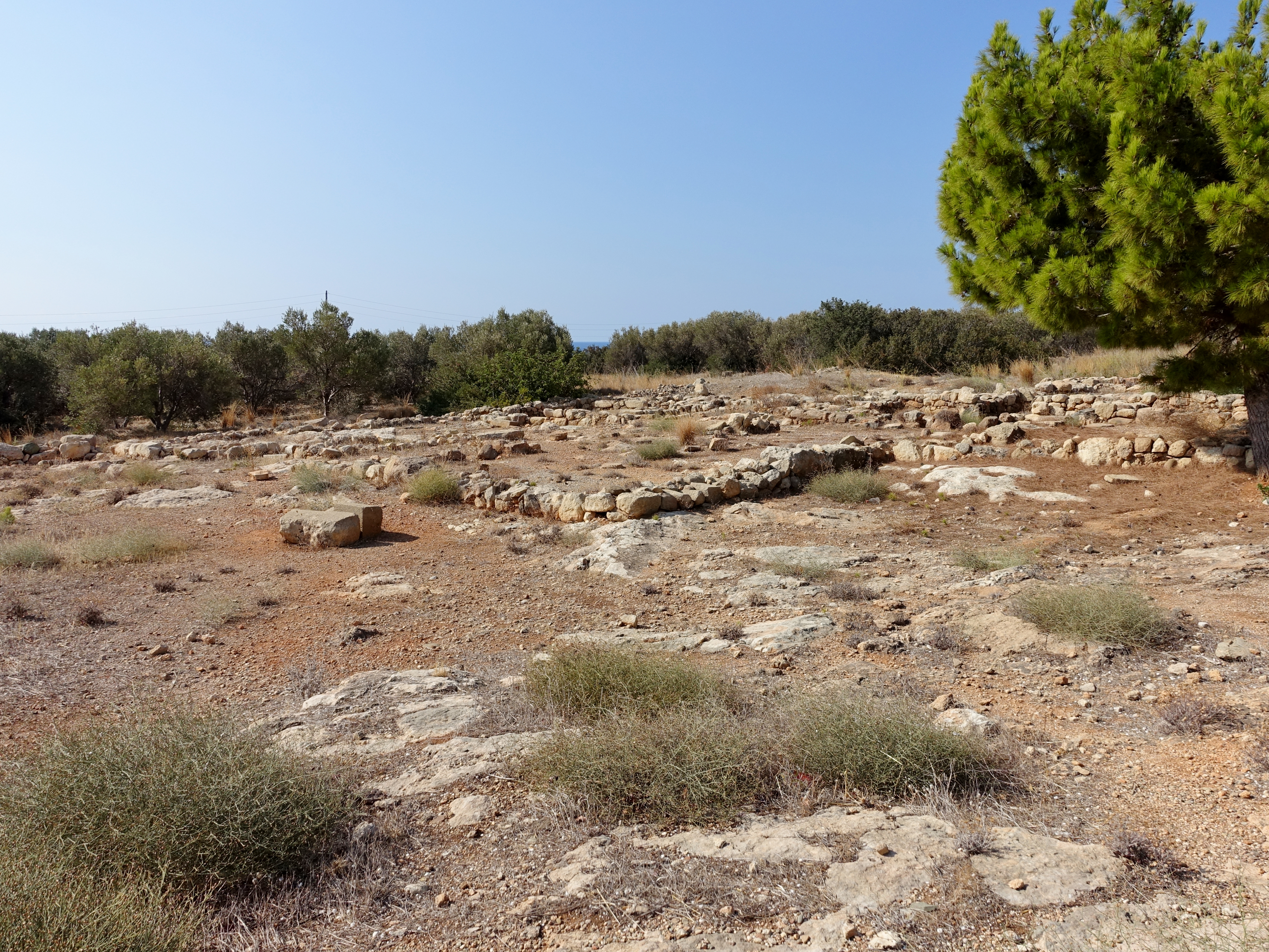 Ausgrabungsstätte der minoischen Villa von Makrygialos, Kreta, Griechenland